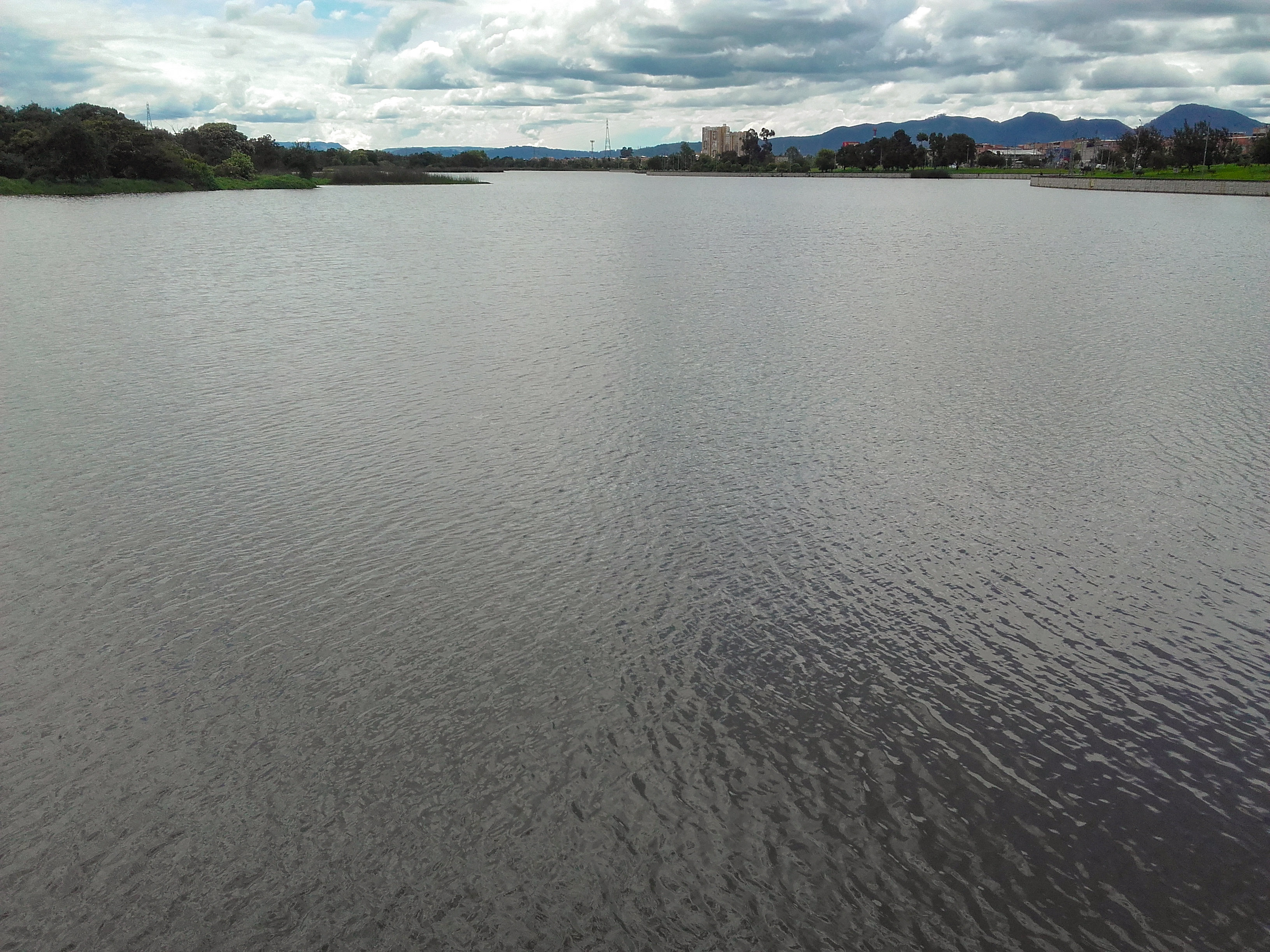 xmdmdmmdmdmdmdmdm